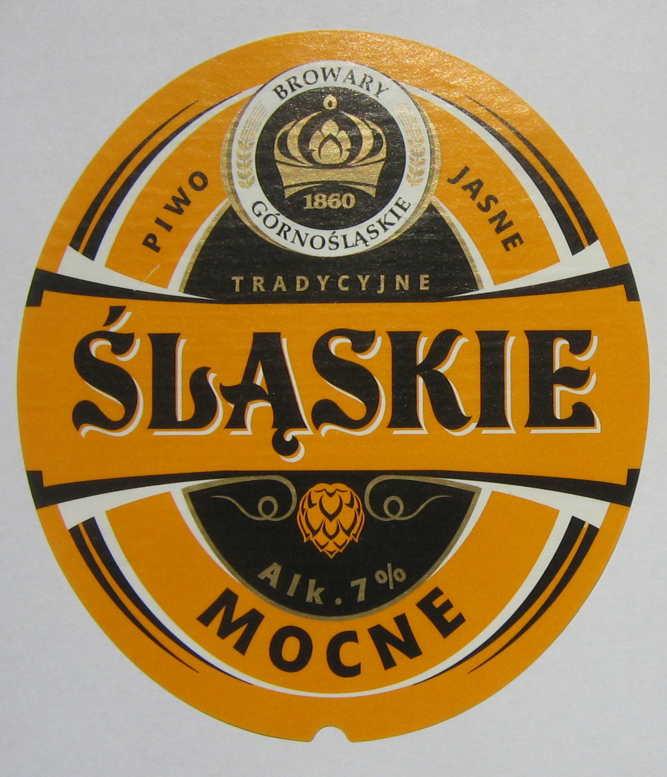 Piwo Śląskie etykieta, 2009 r.